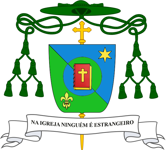 Brasão episcopal de Dom Alessandro Carmelo Ruffinoni